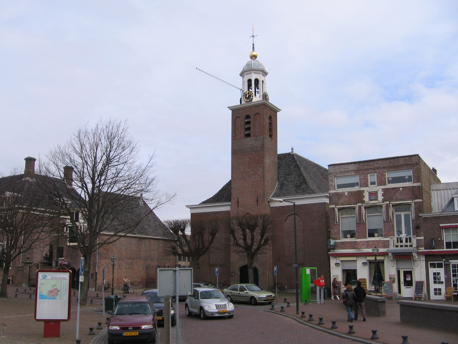 Hellevoetsluis